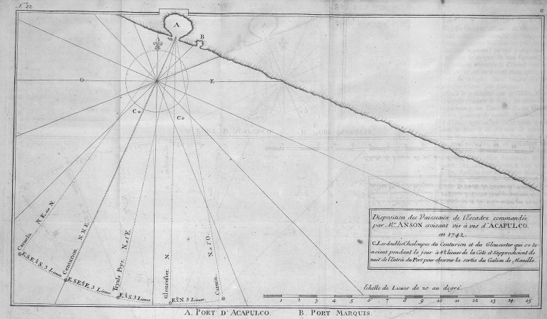 [Illustrations de Voyage autour du monde] Auteur : George Anson Éditeur : Henri-Albert Gosse et Compagnie (Genève) 1750